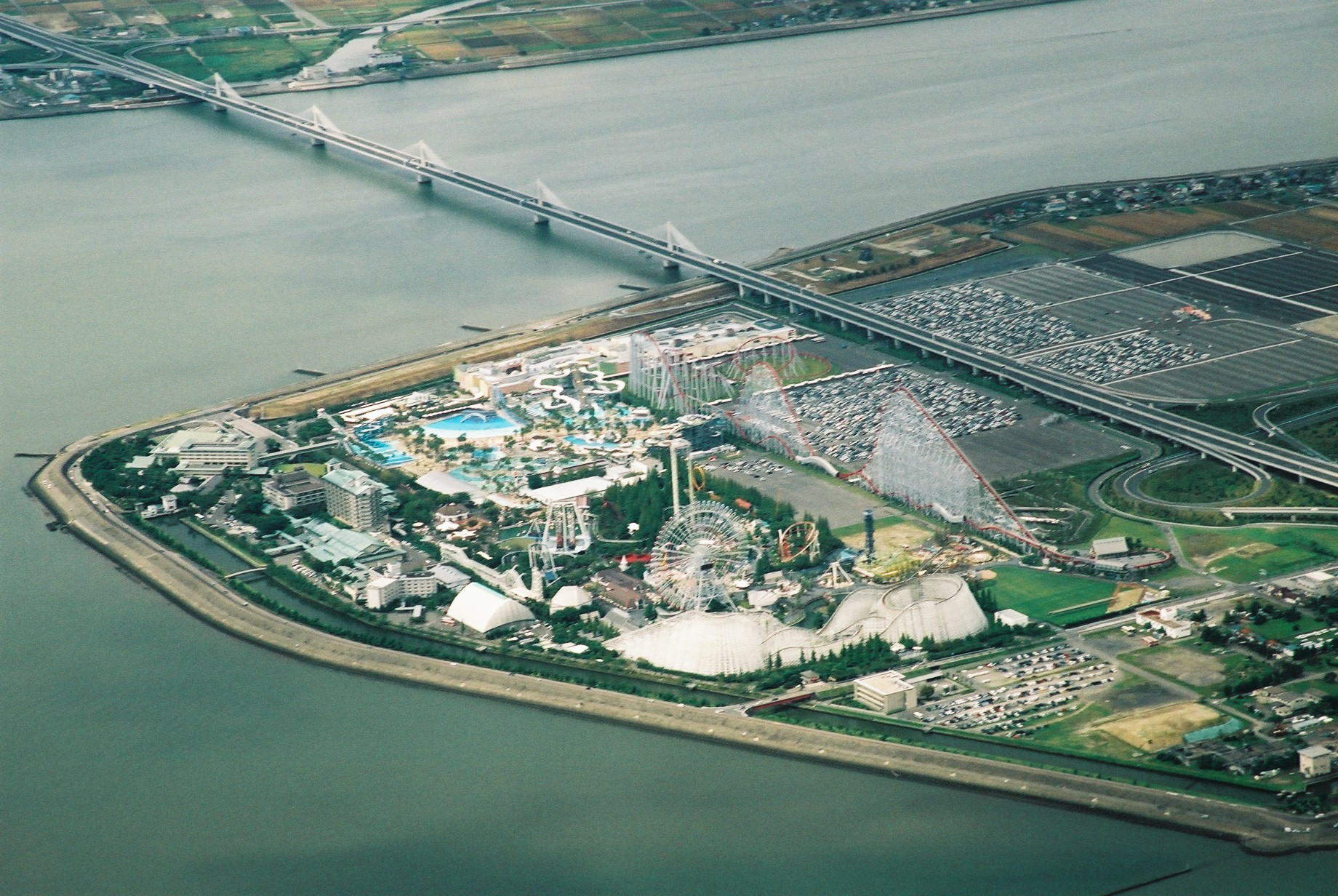 ナガシマスパーランド。 (2006/09/10 In Flight, NH704, JAPAN)